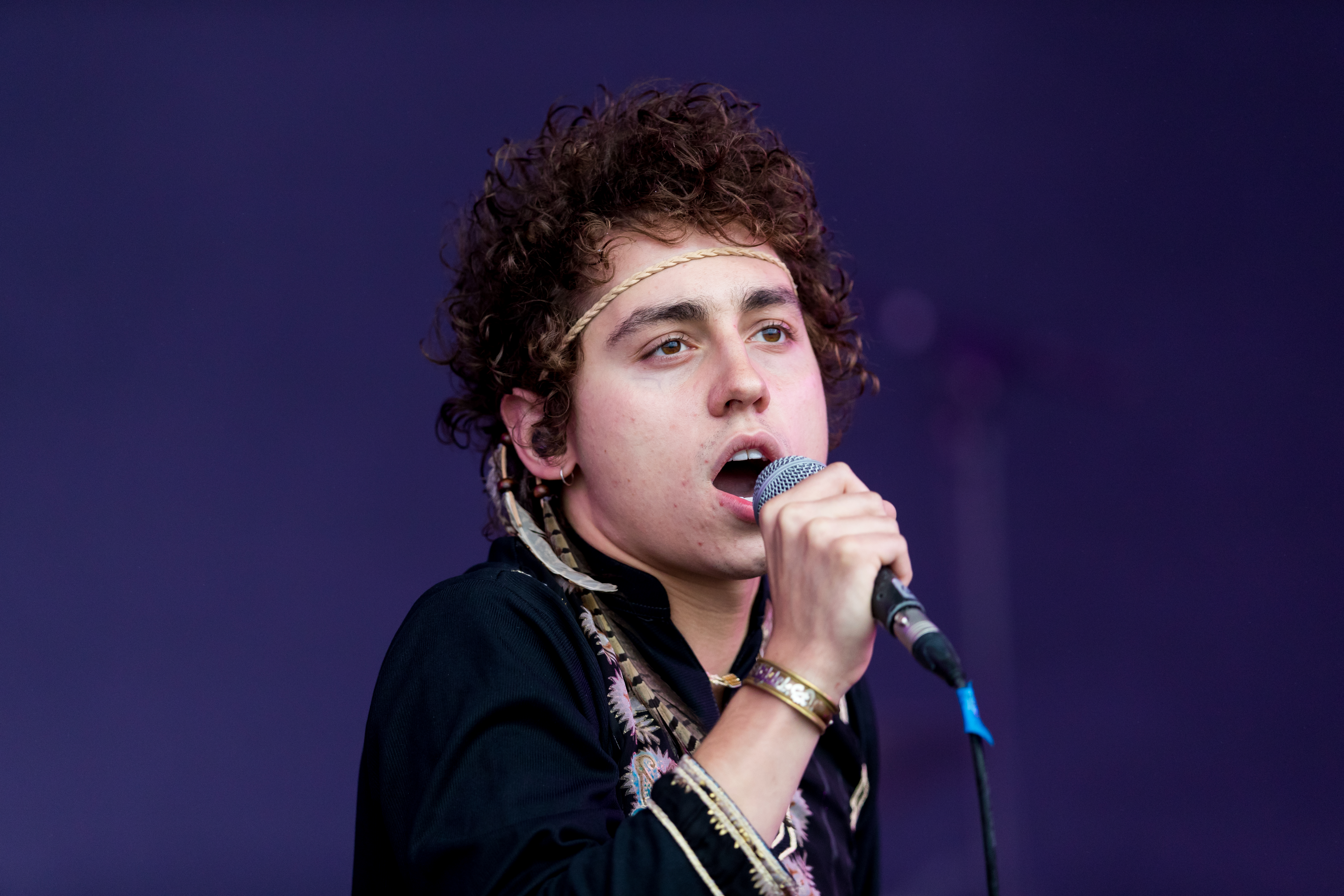 Greta van Fleet @ Rock am Ring 2018